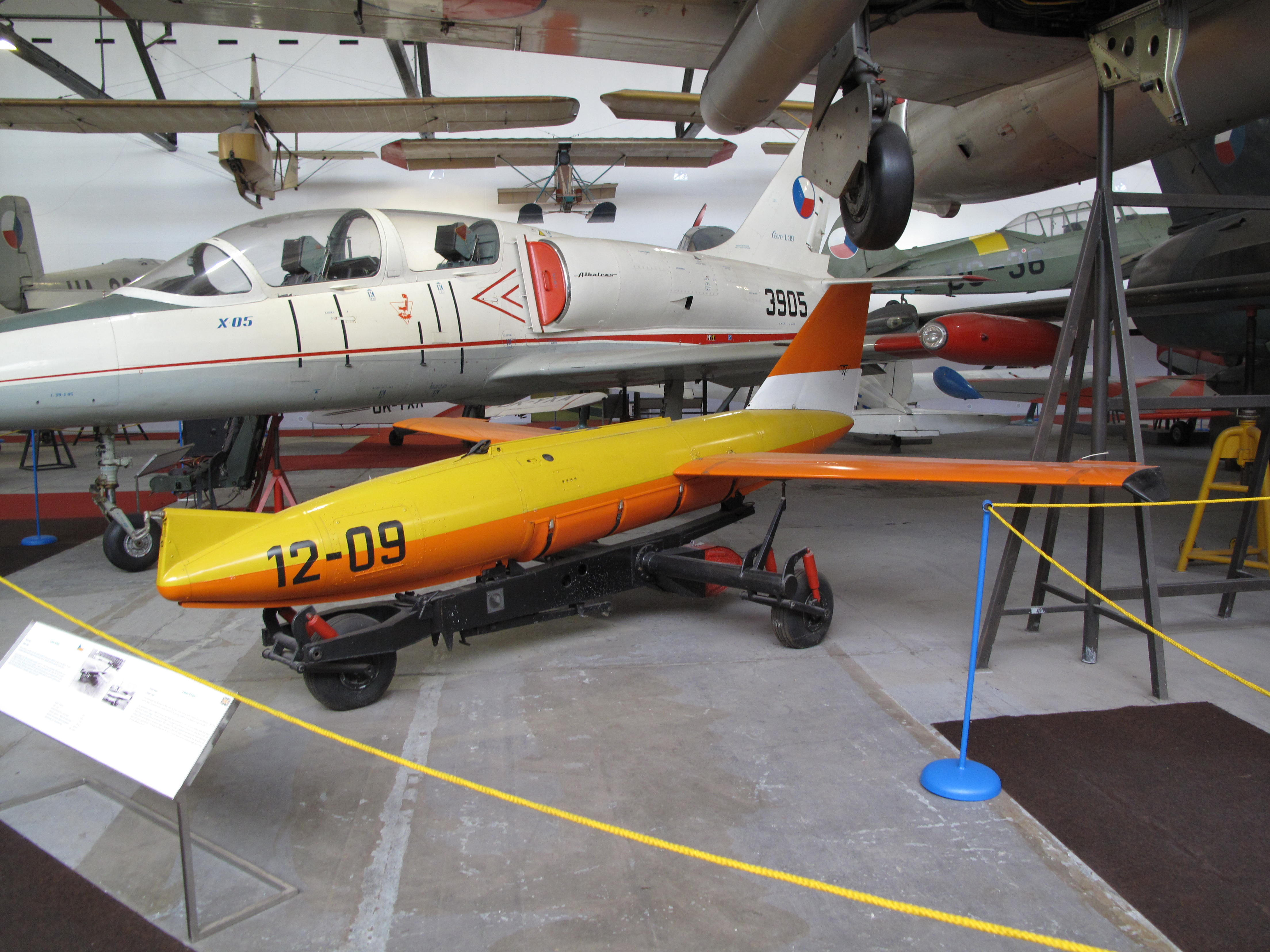 Letecké muzeum Kbely